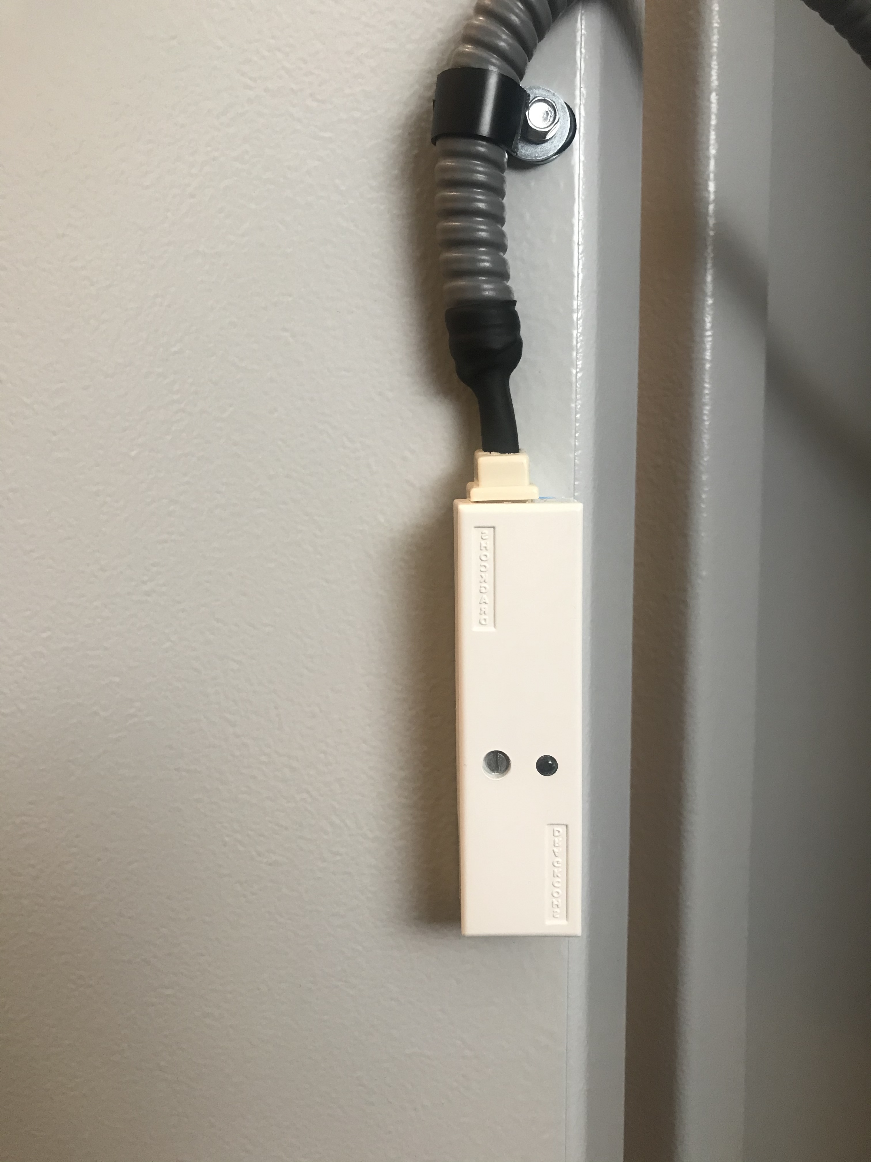 Ein Abus Shockgard Körperschallsensor (aktiv) an einer Tür eines Hartmann Tresor Klasse 1 nach EN 1143-1